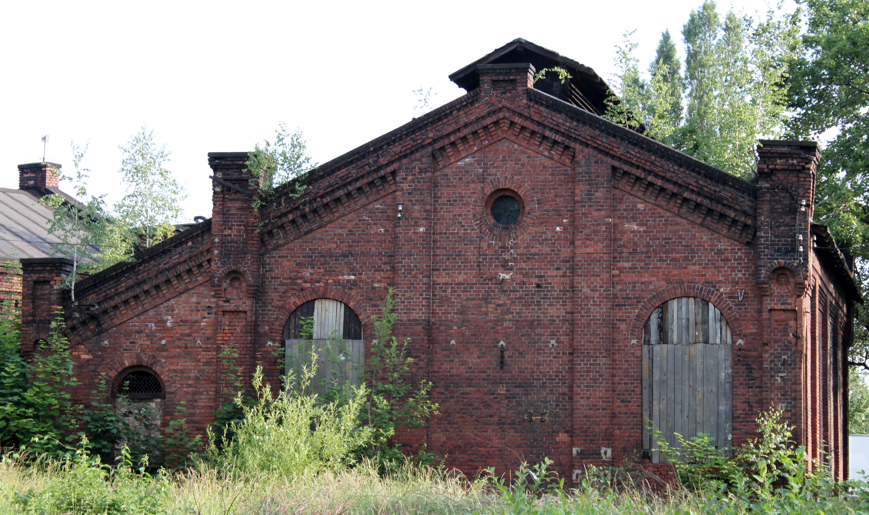 budynek maszyny wyciągowej szybu "Jurand" Ruda Śląską Orzegów, ul. Bytomska 51, Ruda Śląska